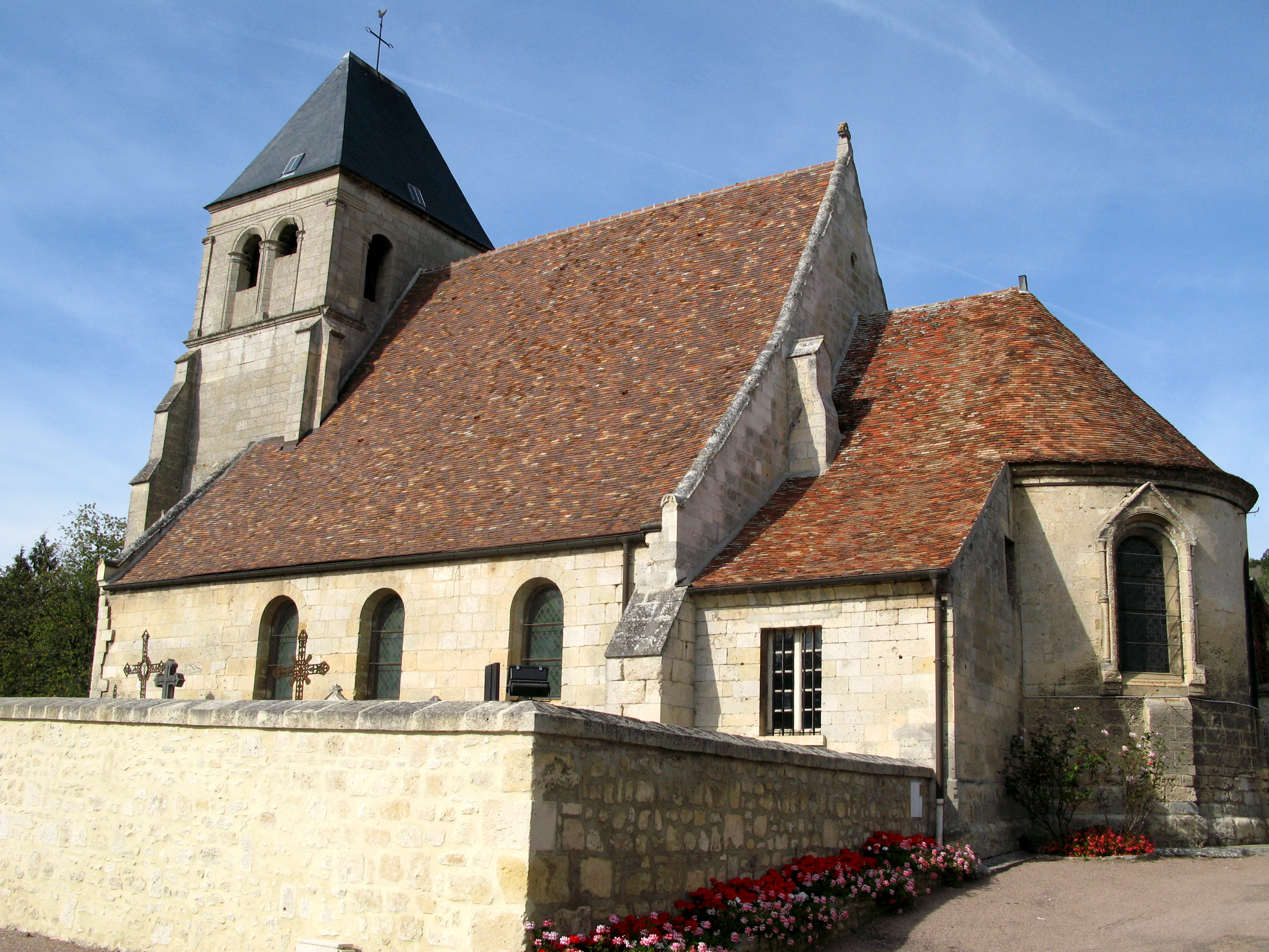 Berny-Rivière (Aisne, France) - L'église Saint-Martin. . . .